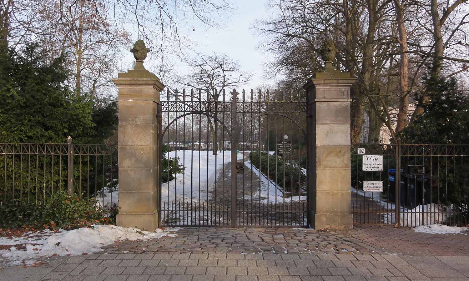 Egestorff-Stiftung in Bremen: Bischofstor (um 1820) ehemals am Wallgraben, seit 1849 Eingang zum Herrenhaus an der Osterholzer Heerstraße Das abgebildete Objekt ist ein geschütztes Kulturdenkmal in der Freien Hansestadt Bremen, mit der Nr. 0970,T007 beim Landesamt für Denkmalpflege registriert.